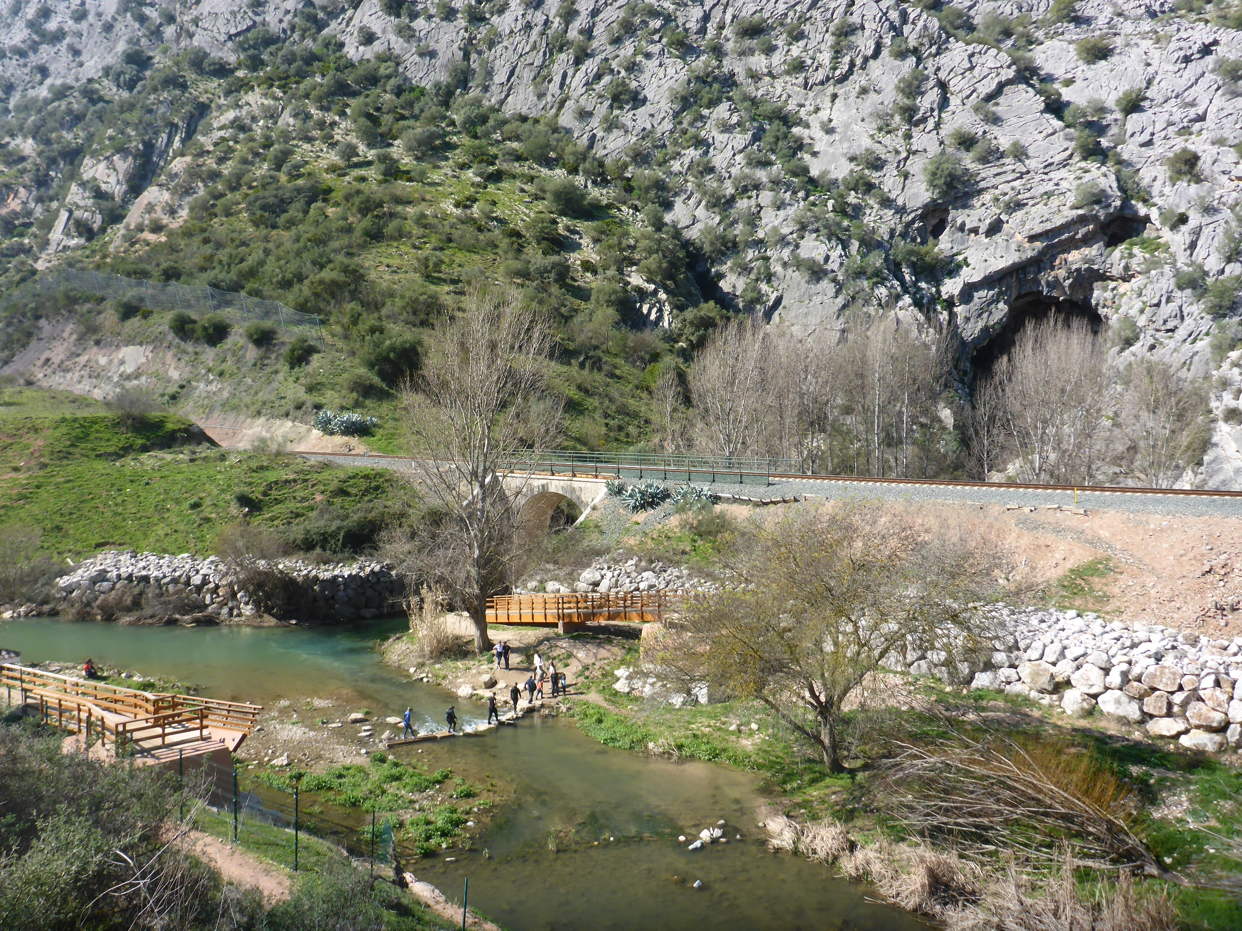 Cueva del Gato (Andalucía, España)